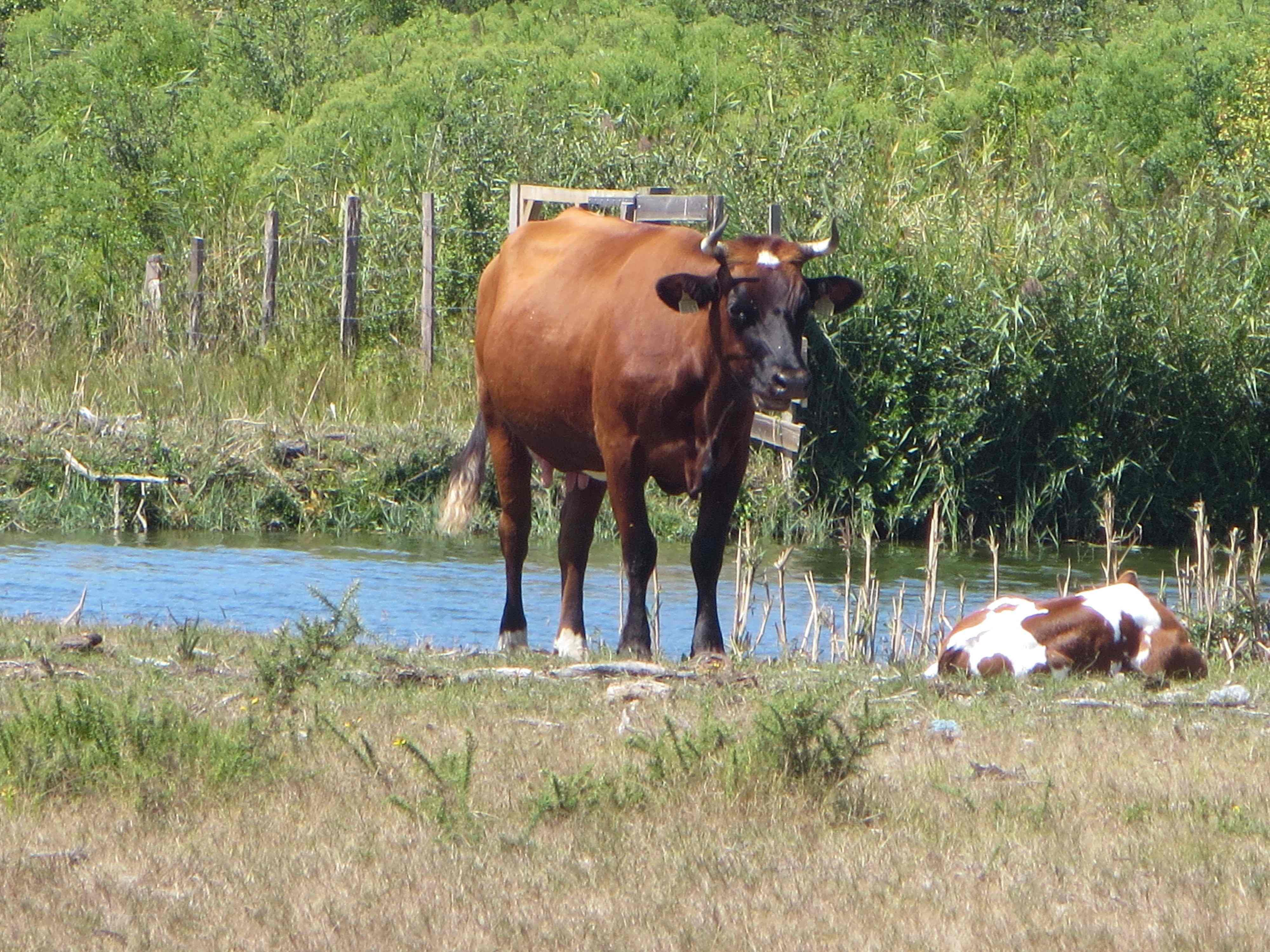 Vache marine landaise et son veau près de Messanges, dans le département des Landes, France